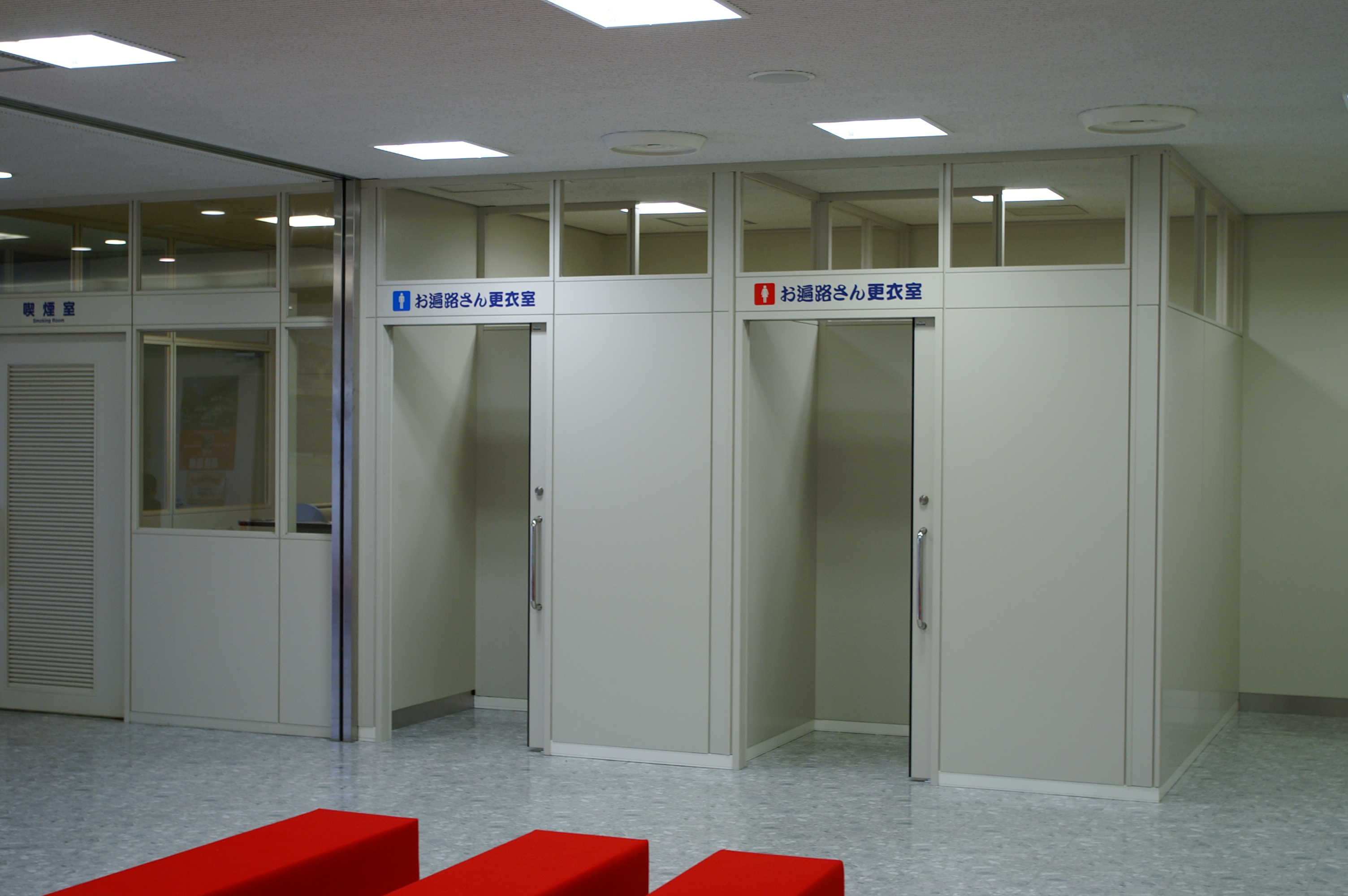 同じく松山空港1階「憩いの広場」にある「お遍路さん着替えコーナー」。 空港に到着して、ここで白装束のお遍路姿に着替えて出掛ける人はどれくらいいらっしゃるのでしょう？ (2006/08/23 Matsuyama Airport, Ehime, JAPAN) [1]